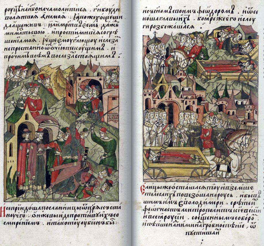 ЛИЦЕВОЙ ЛЕТОПИСНЫЙ СВОД [После этого прошло некоторое время, и прибежали к нему отроки, горько плача, все в слезах, и сказали: «Господин, любимый наш князь, уже грядут за тобой, убийцами твоими посланы от царя Азбяка Беркан и Черкас». Он же, воздев] руки на небо, начал молиться: «Господи, да сбудется воля Твоя, а не моя, и как захочешь — быть мне живому или мертвому — подай мне милость свою и прости мне все прегрешения мои!» И когда он молился, слезы непрестанно текли из очей его, и все вокруг стояли со слезами. И вот, пришли посланники от царя к стану его. Он же вышел к ним со смирением. И так и был убит с сыном своим Феодором: отсекли им головы. Бояре же и слуги разбежались. Некоторые же, оставшиеся тут, взяли их тела и повезли на Русь. И, когда были они во Владимире, встретил их Феогност, митрополит Киевский и всея Руси, со священным собором, исполнили надгробное пение и отпустили их.